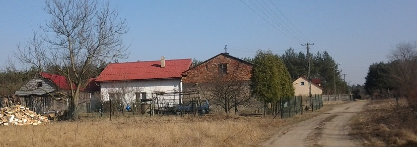 widok na wieś Nowiny Brdowskie w marcu 2012